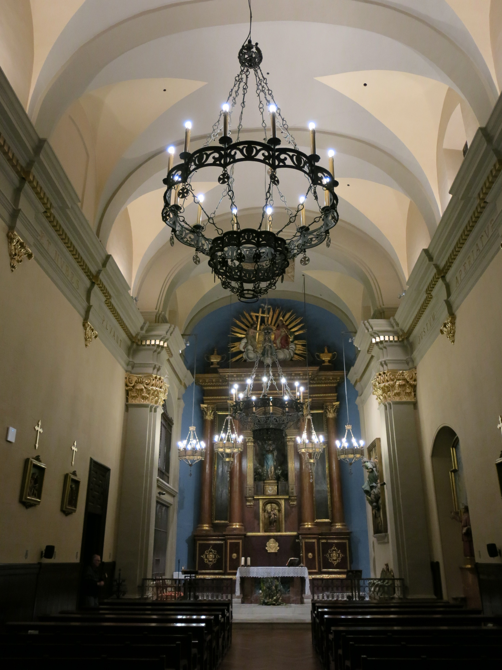 Església de l'Esperança (Barcelona)